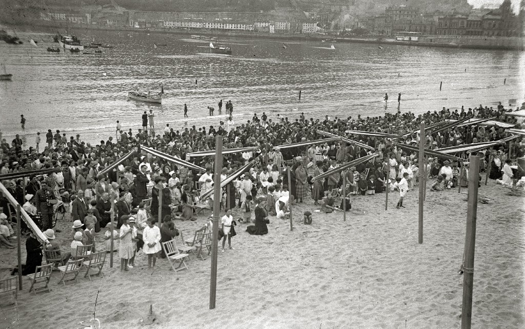 Título original: Ambiente en un día de regatas en San Sebastián (2/2) Localización: San Sebastián (Guipúzcoa)